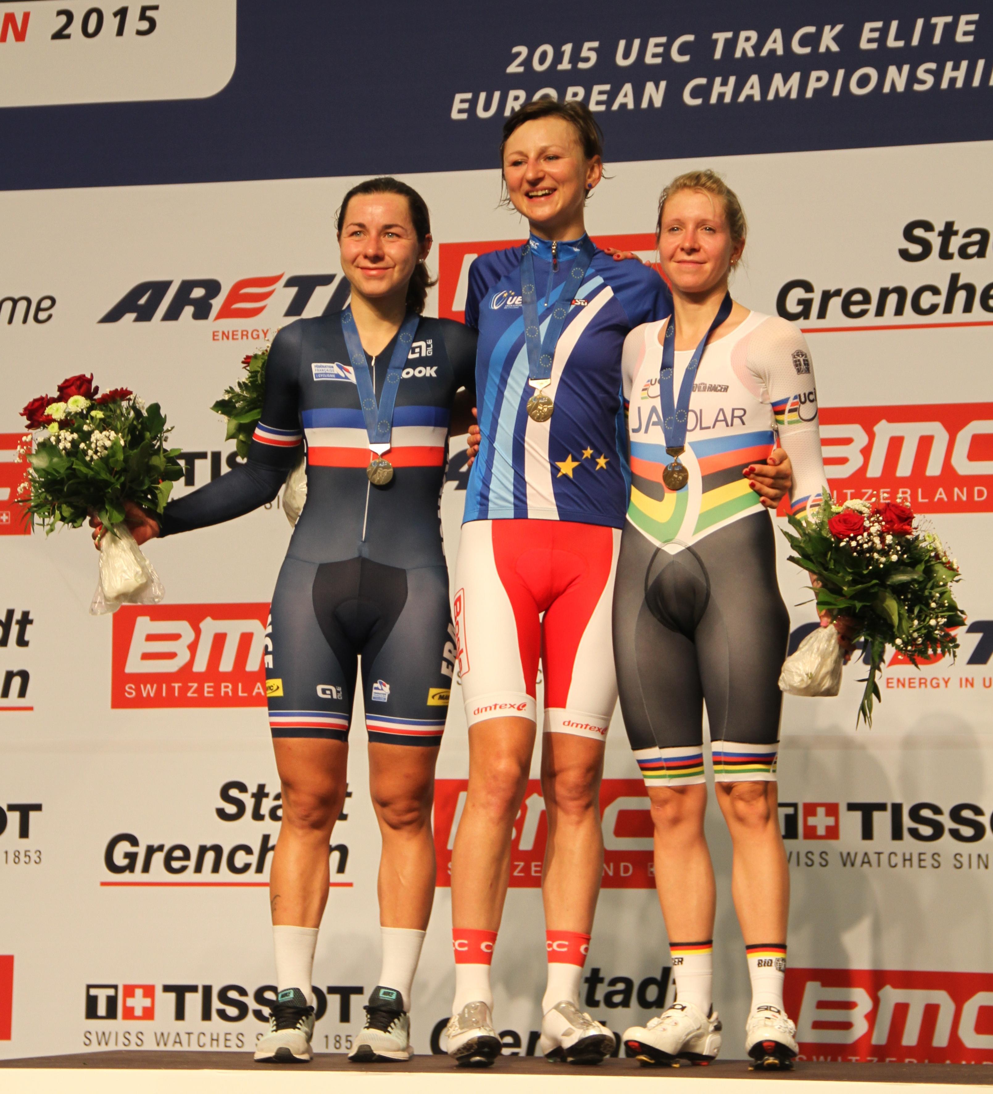 Podium Punktefahren (v.l.n.r.): Èlise Delzenne, Katarzyna Pawłowska, Stephanie Pohl The making of this document was supported by the Community-Budget of Wikimedia Germany.